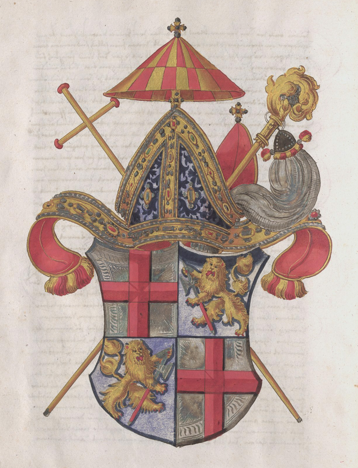 Wappen aus der Zimmerischen Chronik, Handschrift B, Württembergische Landesbibliothek Stuttgart, Cod. Don. 580a, S. 108, Wappen des Konrad von Zimmern, Abt von Reichenau